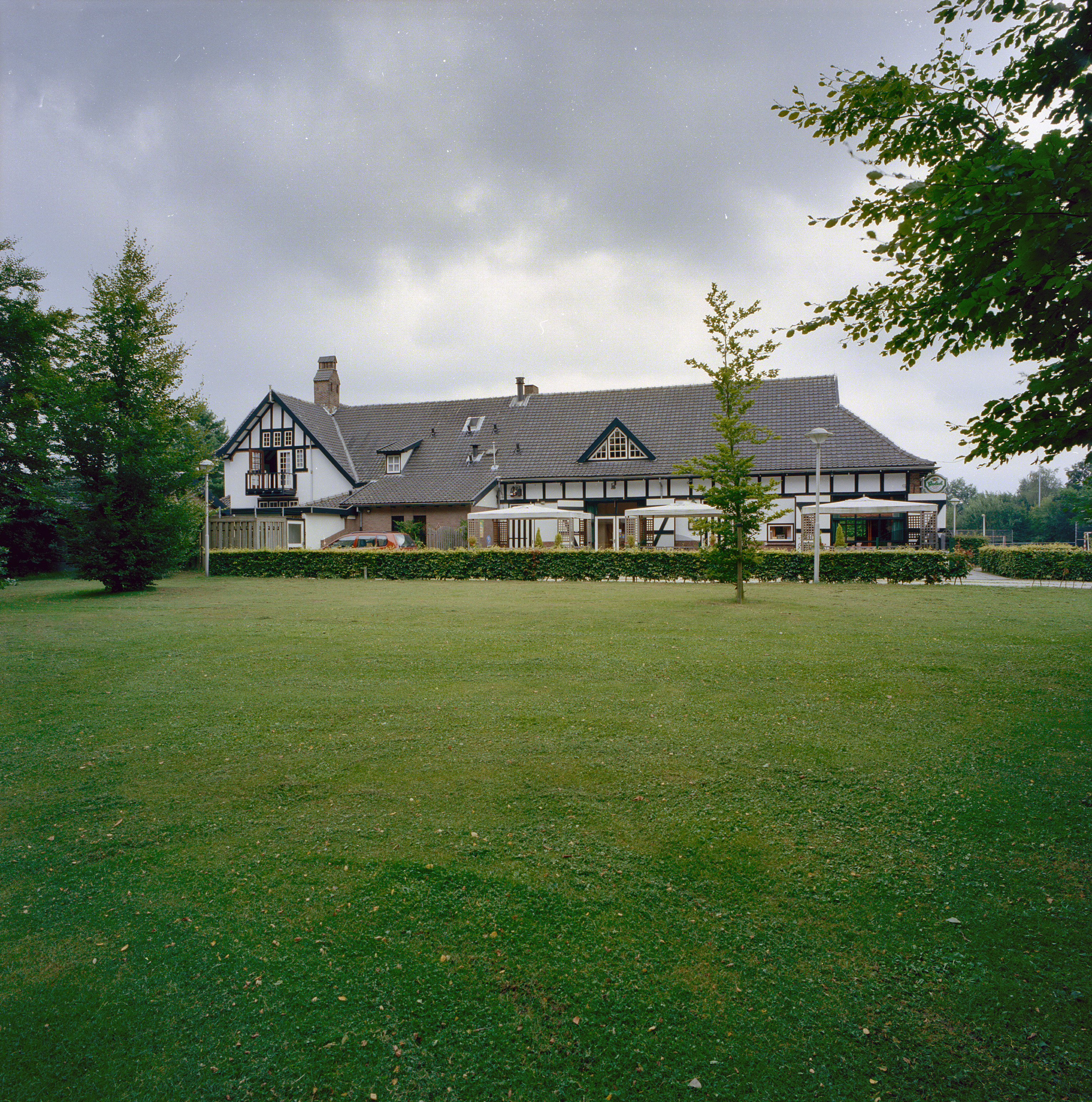 Hofstede De Blaak: Overzicht voorgevel